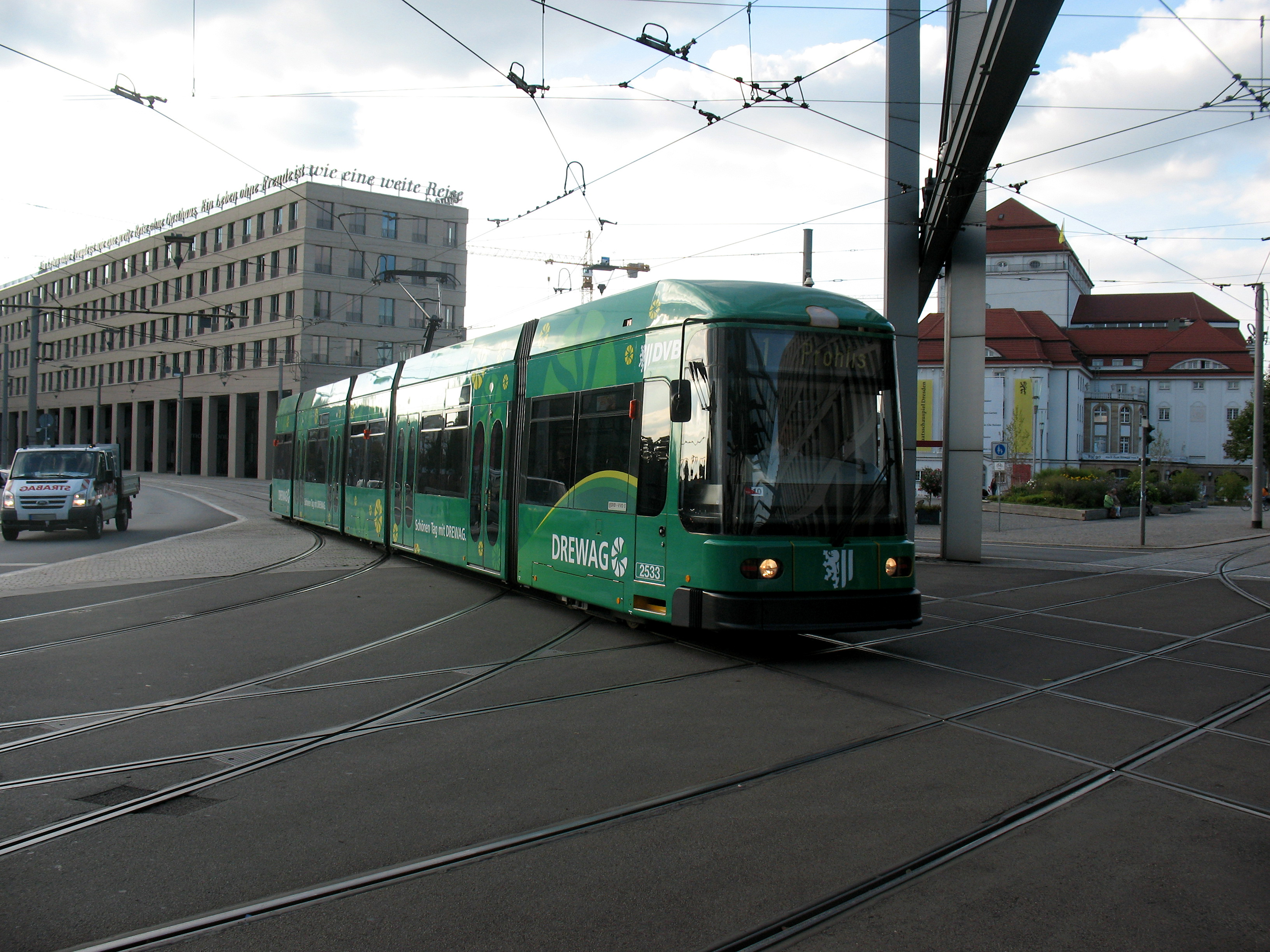 + 00000000025_Image_Postplatz_Dresden_Germany